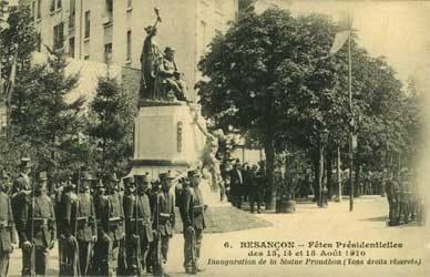 Les 13, 14 et 15 août 1910, à Besançon, inauguration de la statue en bronze de Pierre-Joseph Proudhon, réalisée par le sculpteur bisontin Georges Laethier.